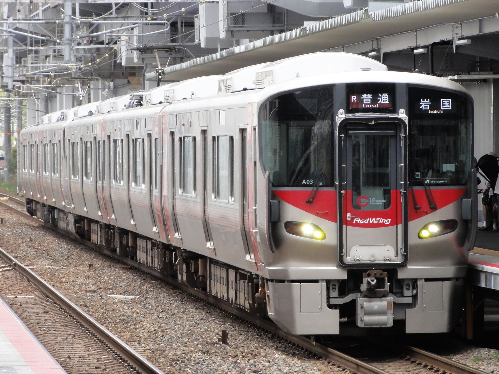 227系A編成(3連)とS編成(2連)を併結した運用